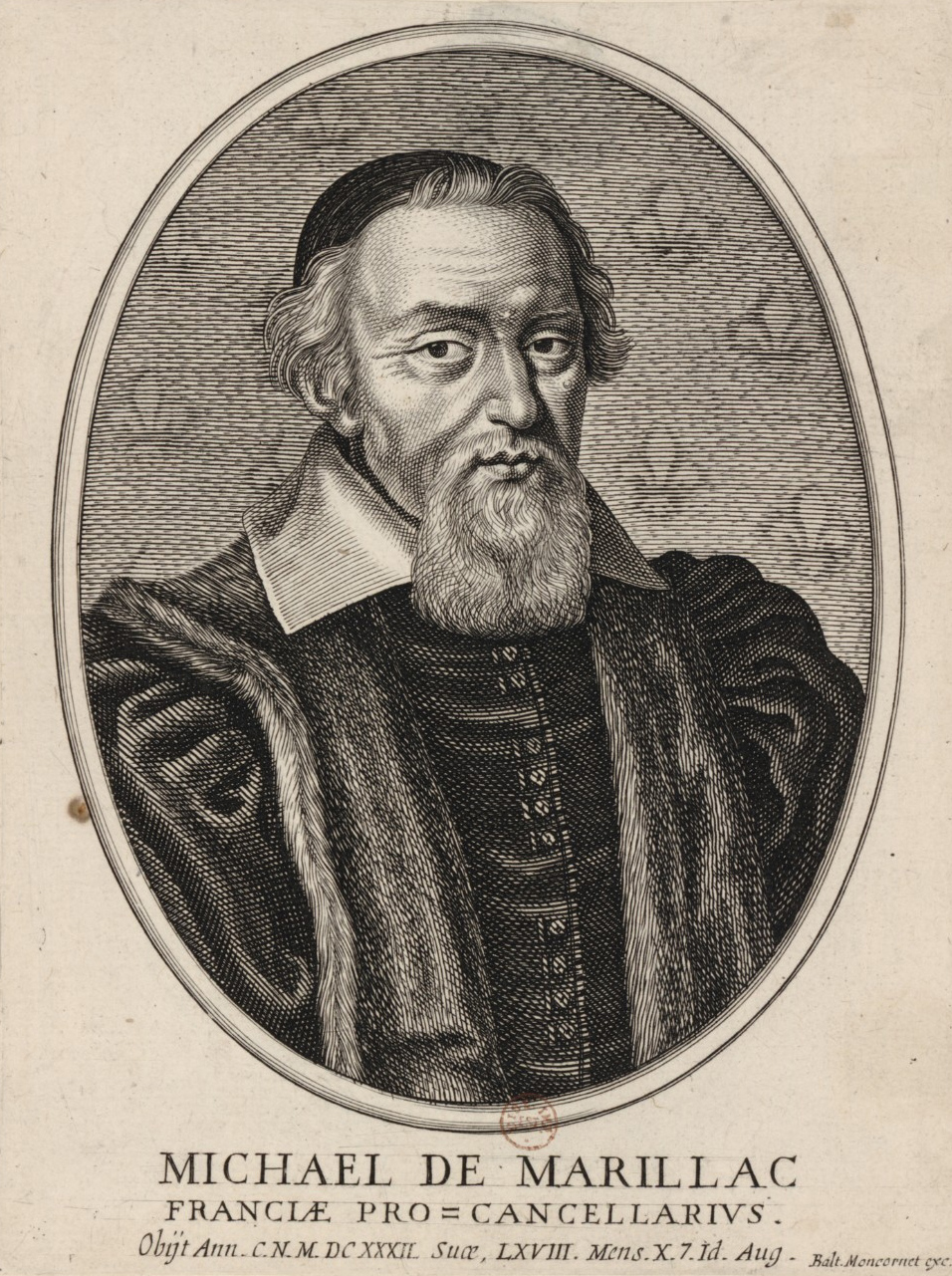 Portrait du garde des sceaux Michel de Marillac, en buste, de 3/4 dirigé à droite, dans une bordure ovale.